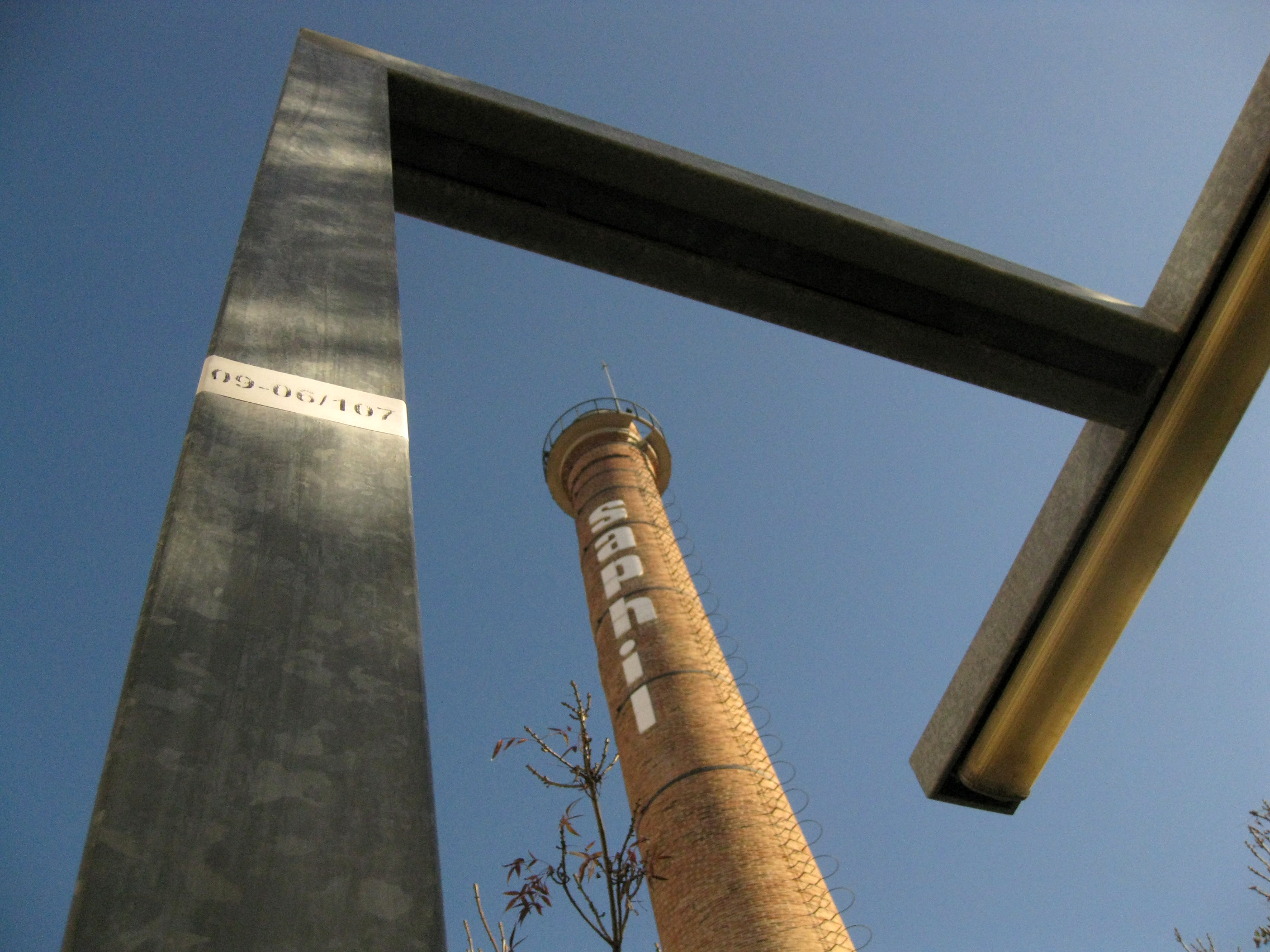 Xemeneia de la SAPHIL (Sociedad Anónima de Peinados e Hilaturas), popularment coneguda com l'Anònima, al barri de Ca n'Aurell (Terrassa).